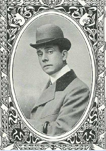 El actor español Fernando Díaz de Mendoza